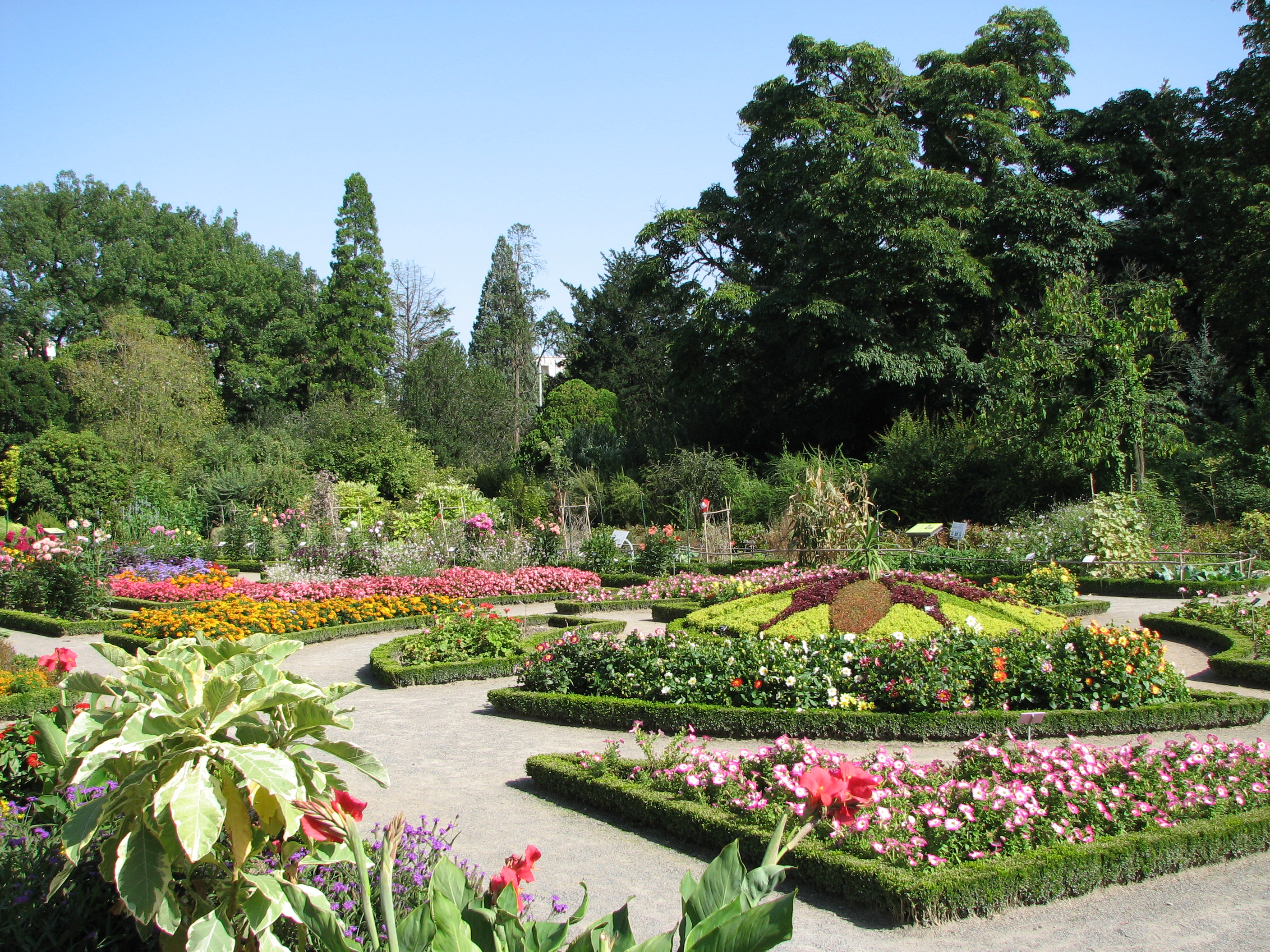 Jardin botanique dans le Parc de la Tête d'Or à Lyon (France)